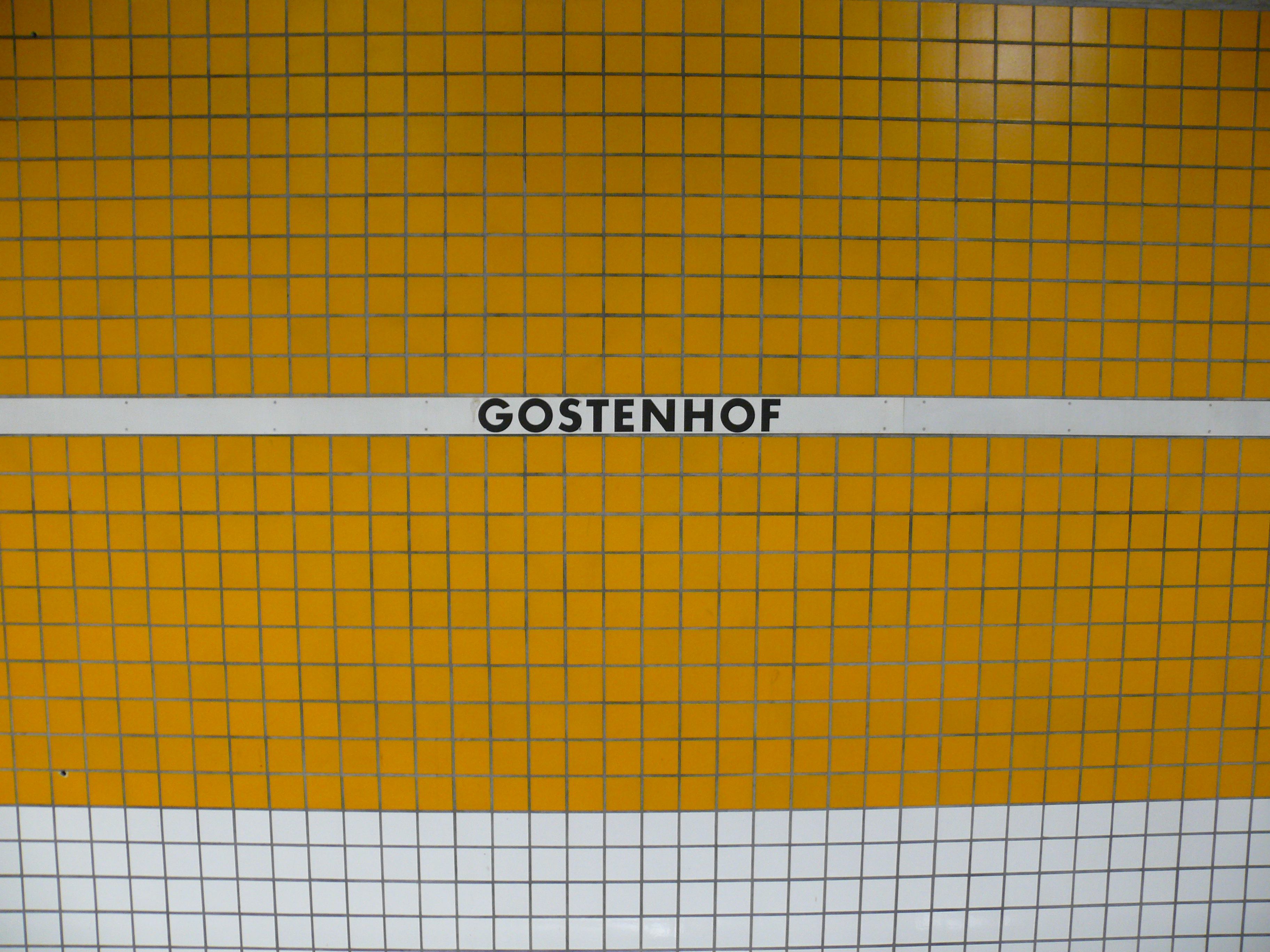 Stationsname an den Bahnsteigwänden am U-Bahnhof Gostenhof in Nürnberg.